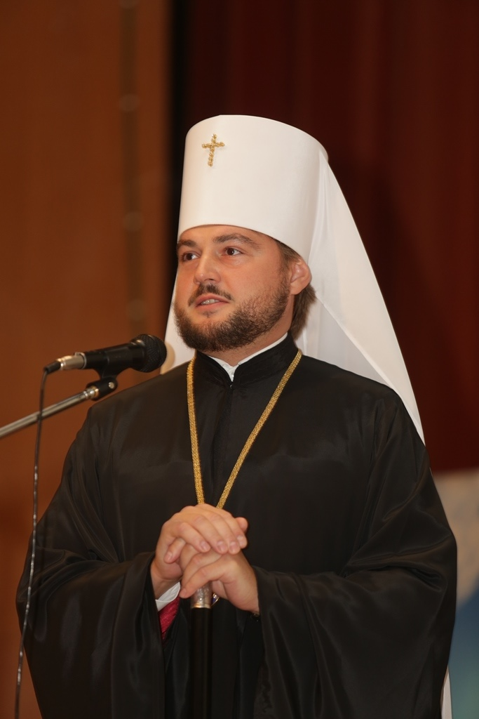 Митрополит Александр (Драбинко)